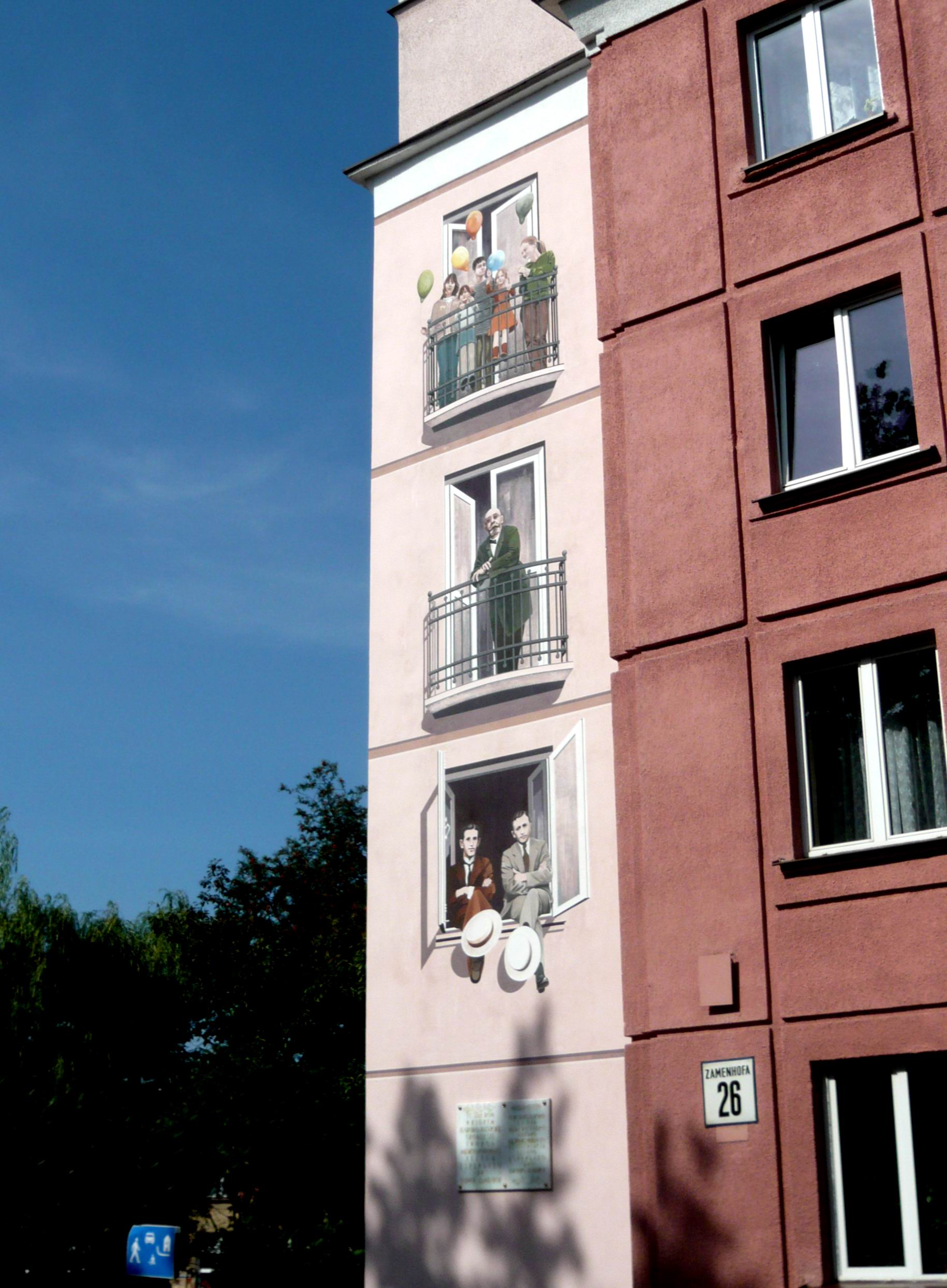 Murpentraĵo en Zamenhofa strato 26 en Bjalistoko